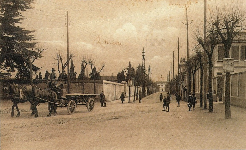 Vecchio Camposanto nell'allora via della Stazione Nord